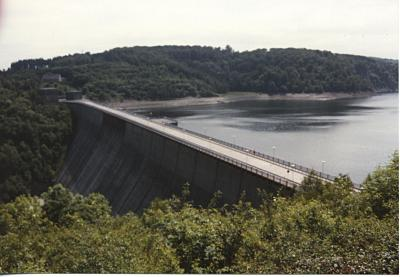 Die Talsperre vom der Seite Aufgenommen von Marian Szengel. Das Bild steht unter der GNU-FDL.